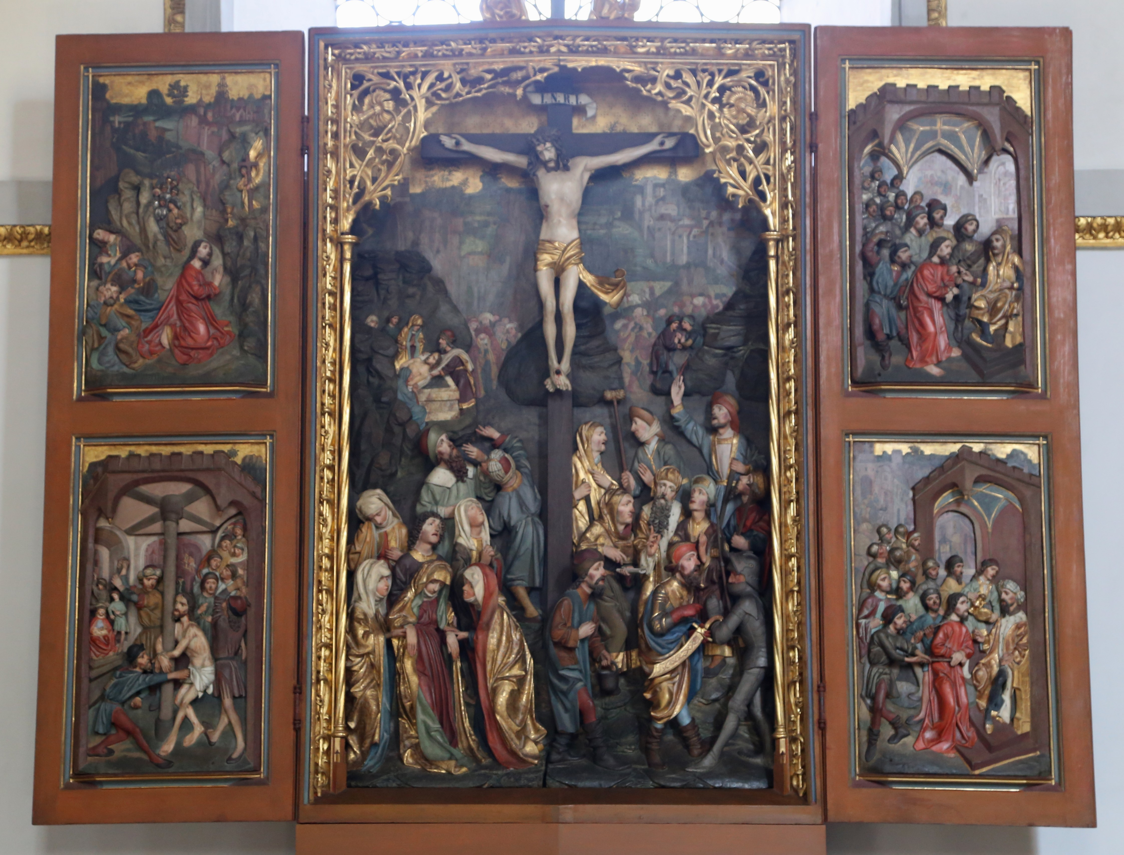 Aribonenstraße 9, München; Katholische Pfarrkirche St. Maria Ramersdorf, Wallfahrtskirche des 15. Jahrhunderts, Wandpfeilerkirche mit eingezogenem Chor, 1675 barockisiert, gotischer Turm mit barockem Helm; mit Ausstattung.